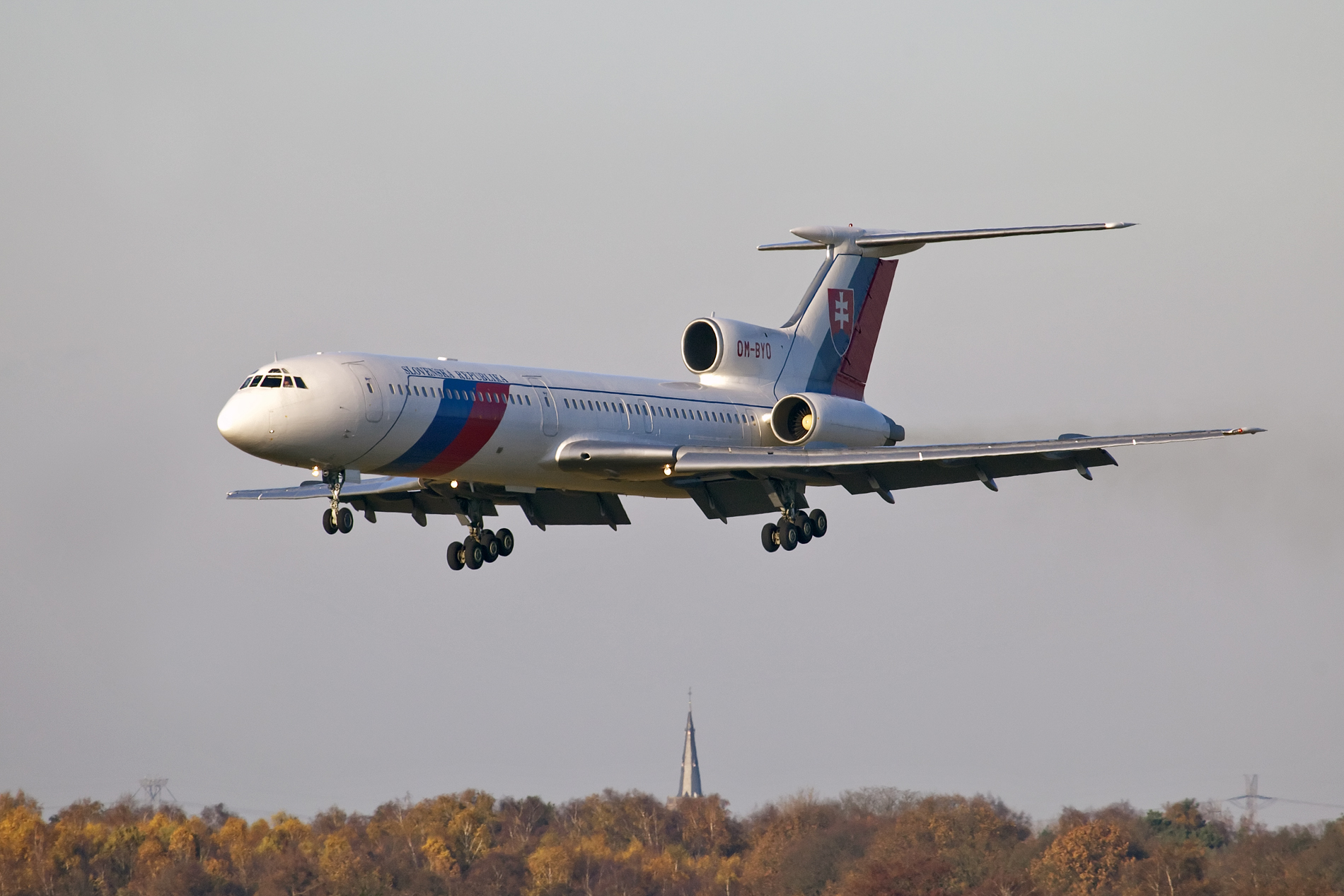 Eindhoven